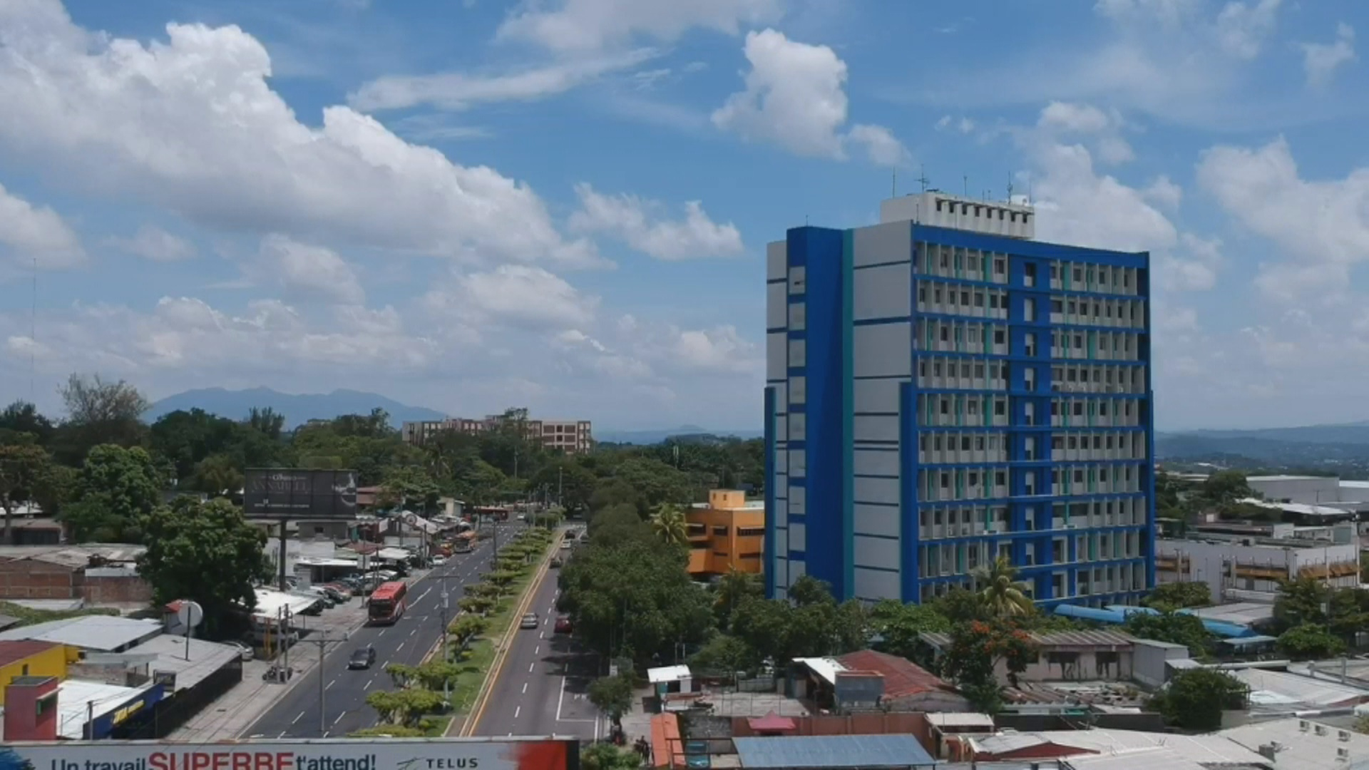 Una vista de la torre de 10 Niveles del Hospitan Nacional de Niños